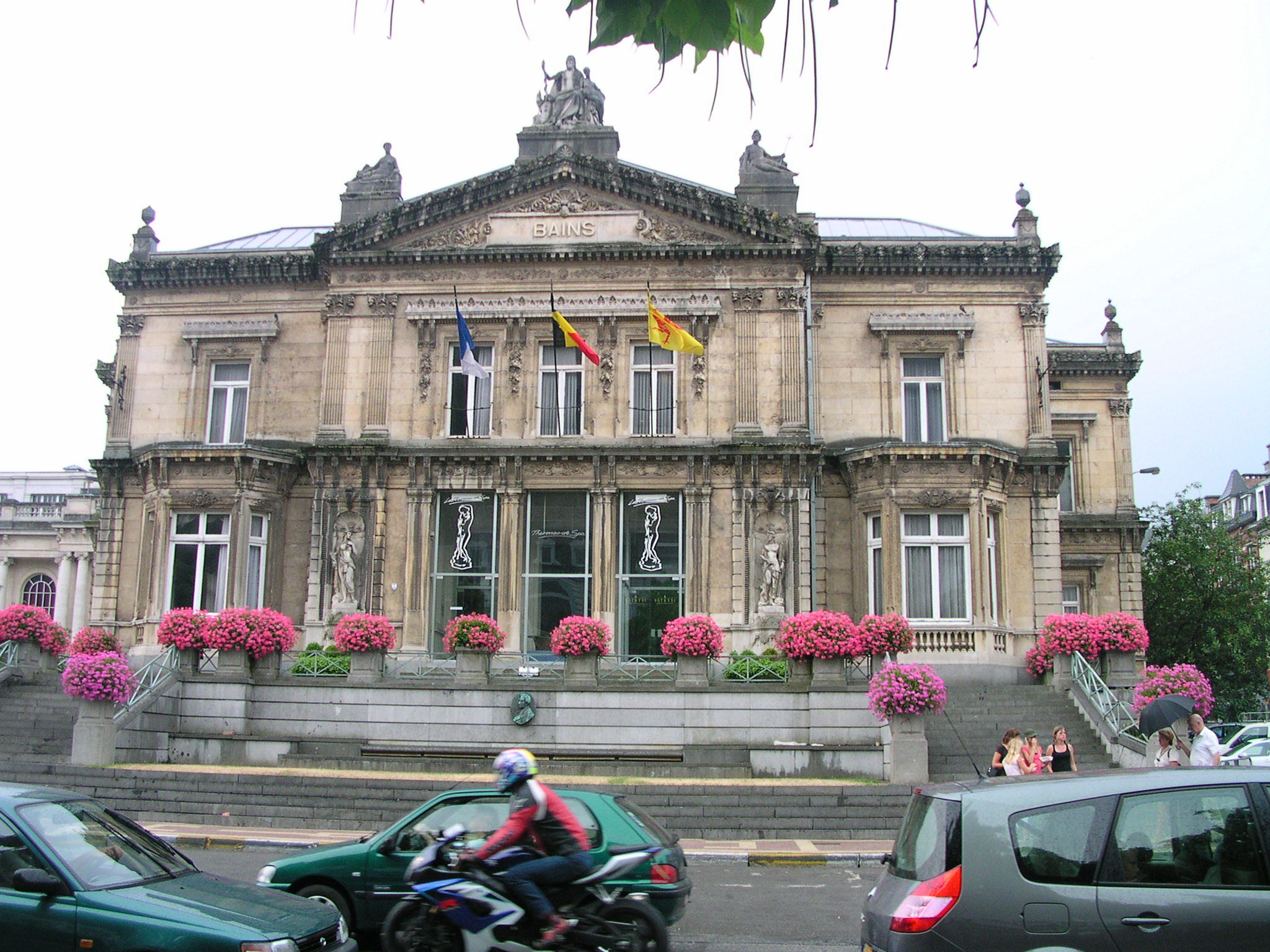 Spa (Belgique), Les Bains